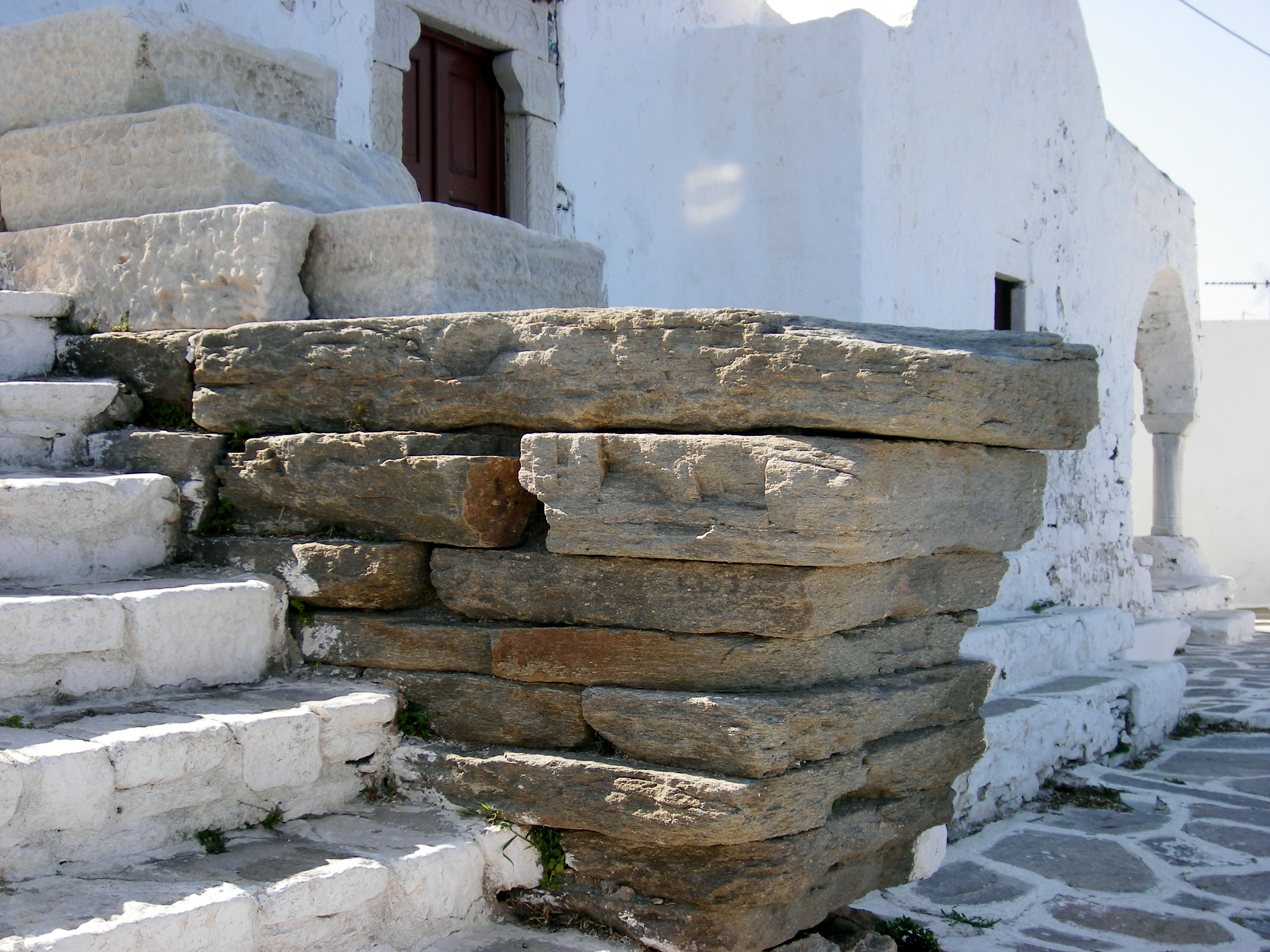 Base et stylobate du temple d'Athéna (VIe siècle avant J. C.) sur le Kastro de Paros. En arrière plan l'église Aghios Konstantinos.